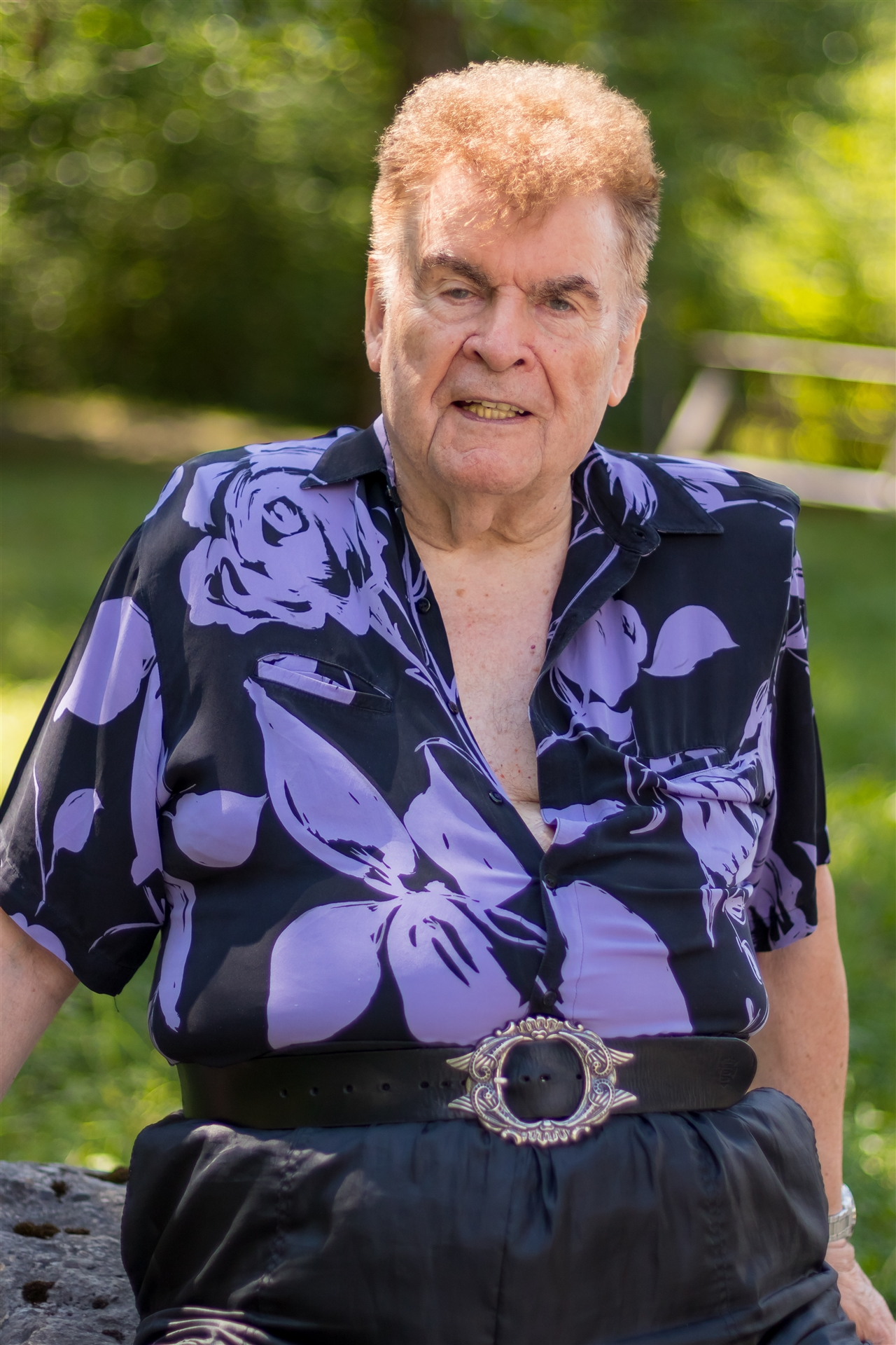 Porträt von Dr. Peter Buser